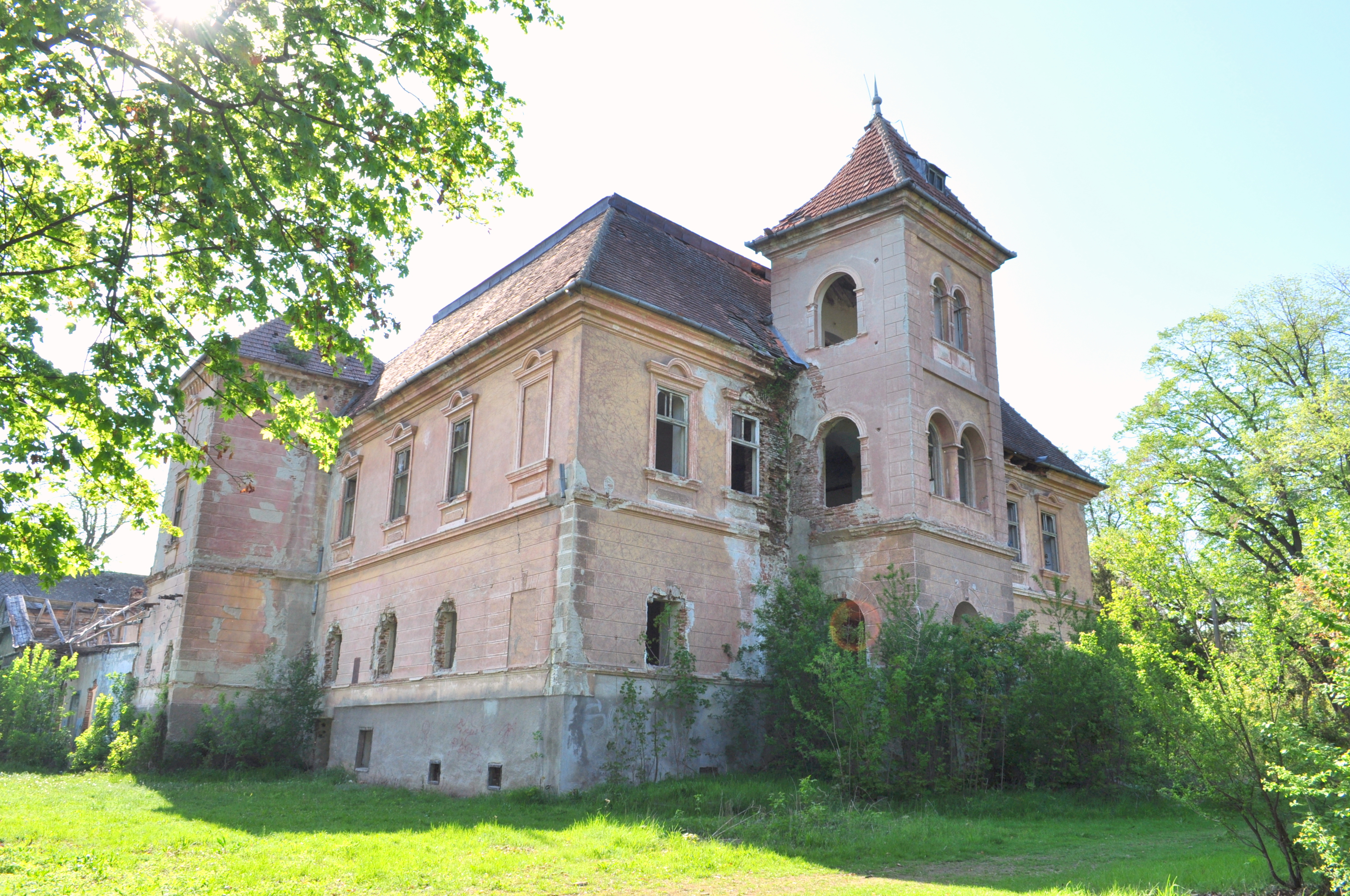 Ansamblul conacului Nalatzi-Fay, localitate componentă NĂLAŢVAD; oraş HAŢEG